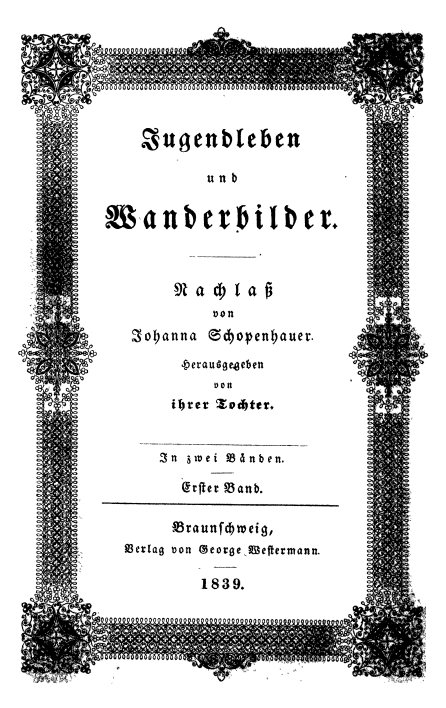 Front page of Jugendleben und Wanderbilder by Johanna Schopenhauer, edited by Adele Schopenhauer